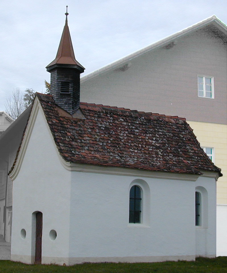 Liste der Baudenkmäler in Durach : Katholische Kapelle St. Wendelin